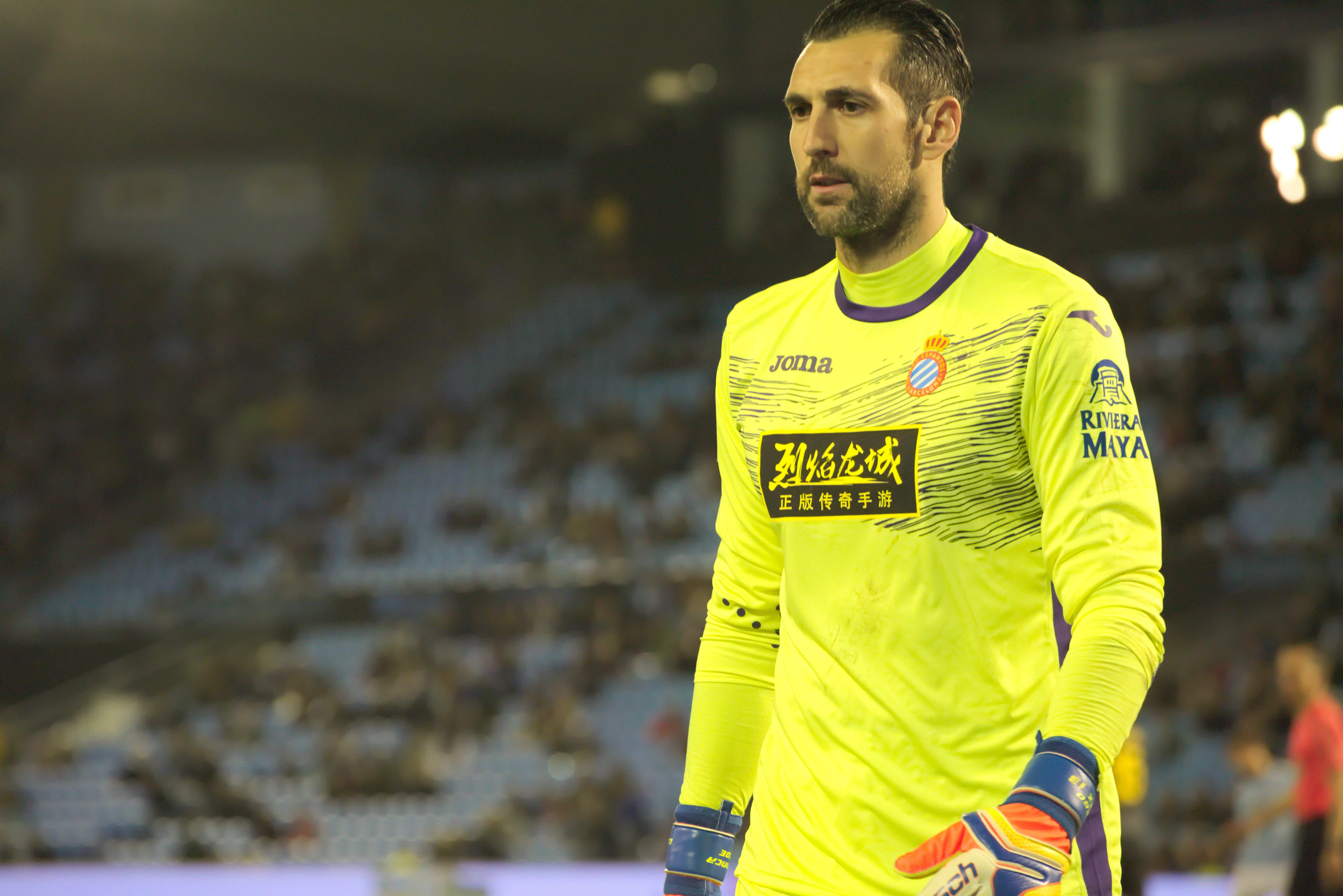 Diego López - RCD Espanyol